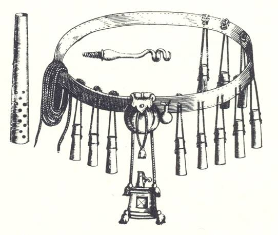 Bandelier eines Arkebusiers